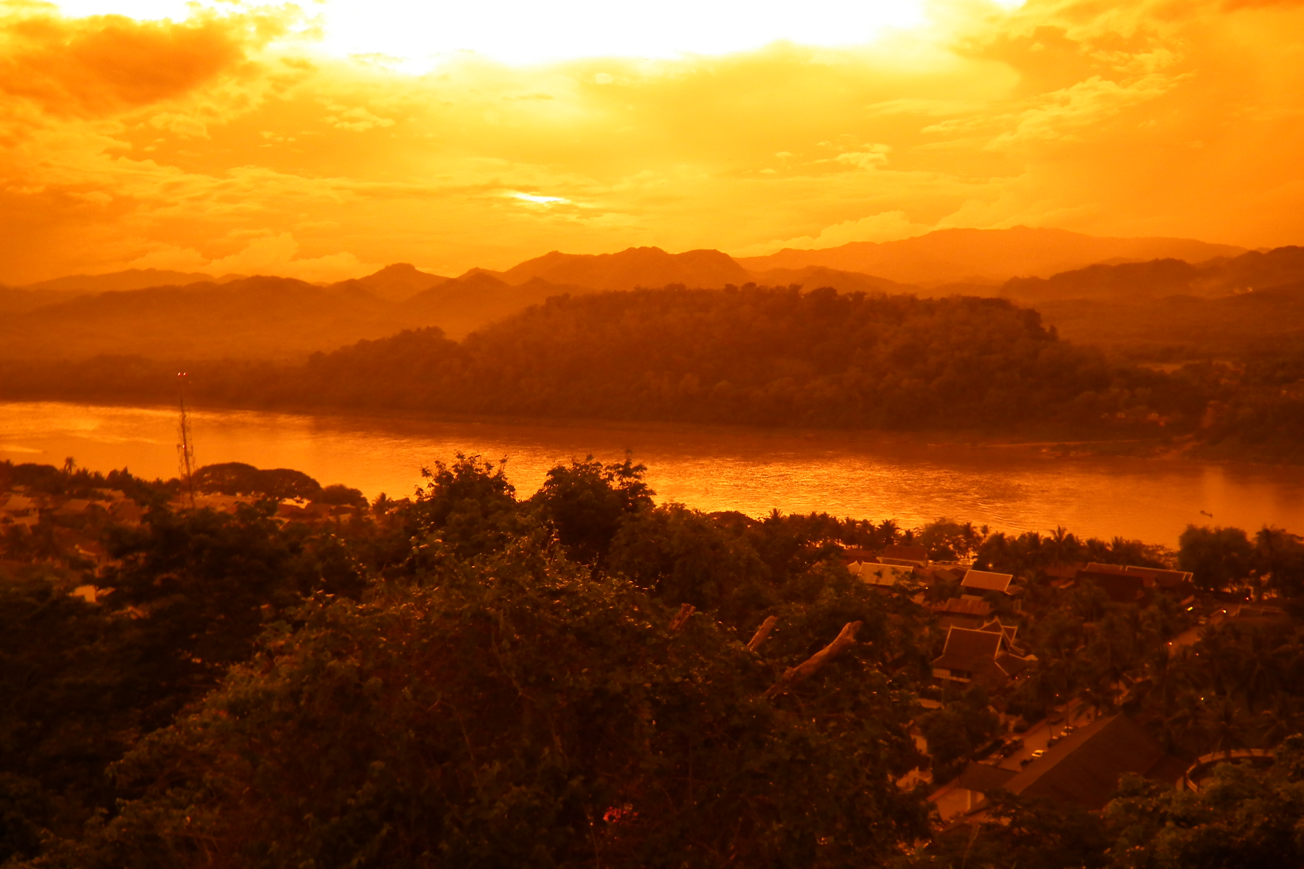 Phou si - Mekong River - Luang Prabang Laos プーシーの丘、メコン川 ラオス・ルアンプラバーン